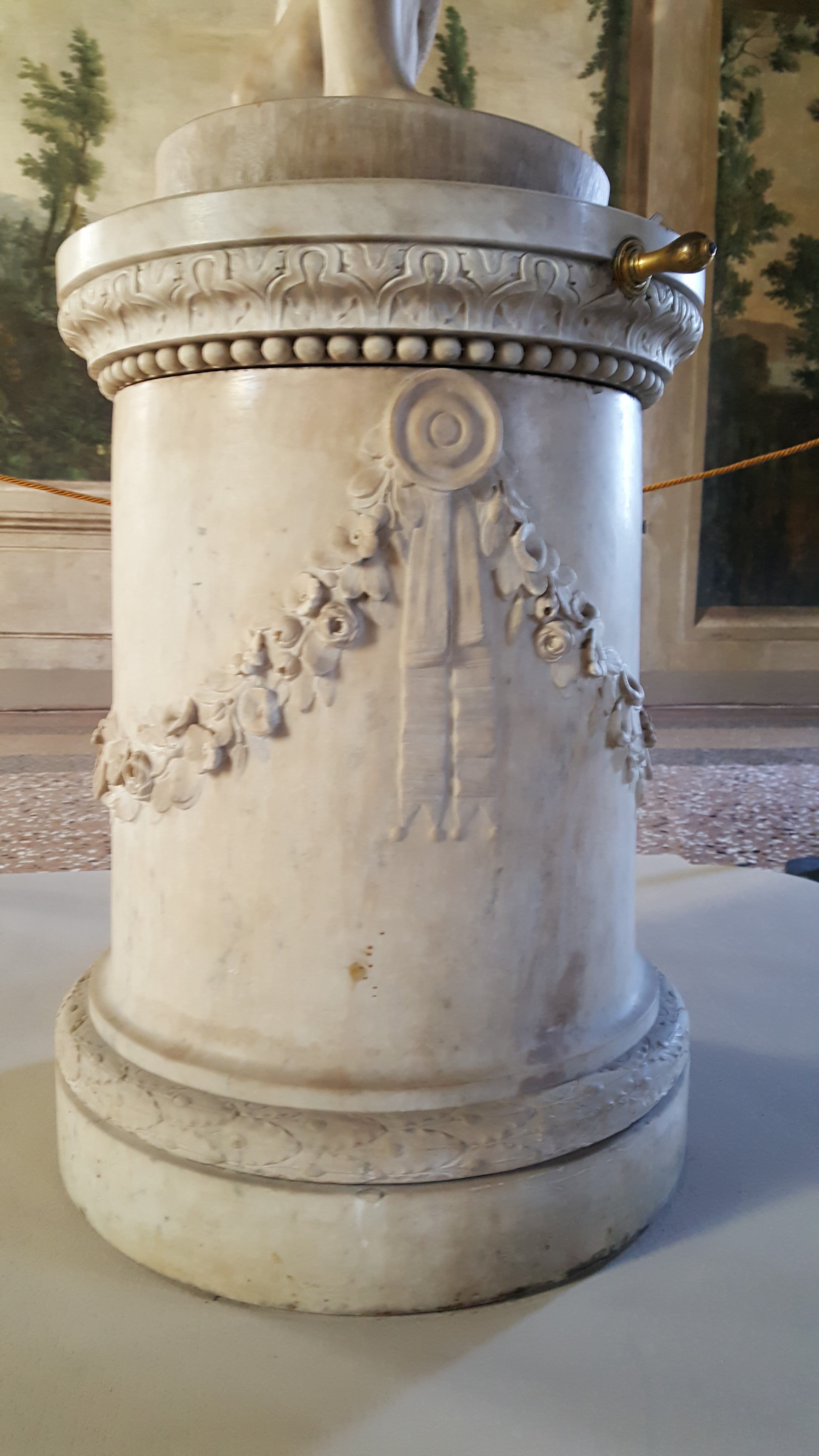 Apollino di Canova This is a photo of a monument which is part of cultural heritage of Italy.